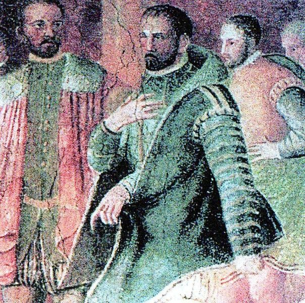 Ritratto di Ascanio della Corgna (Pomarancio)